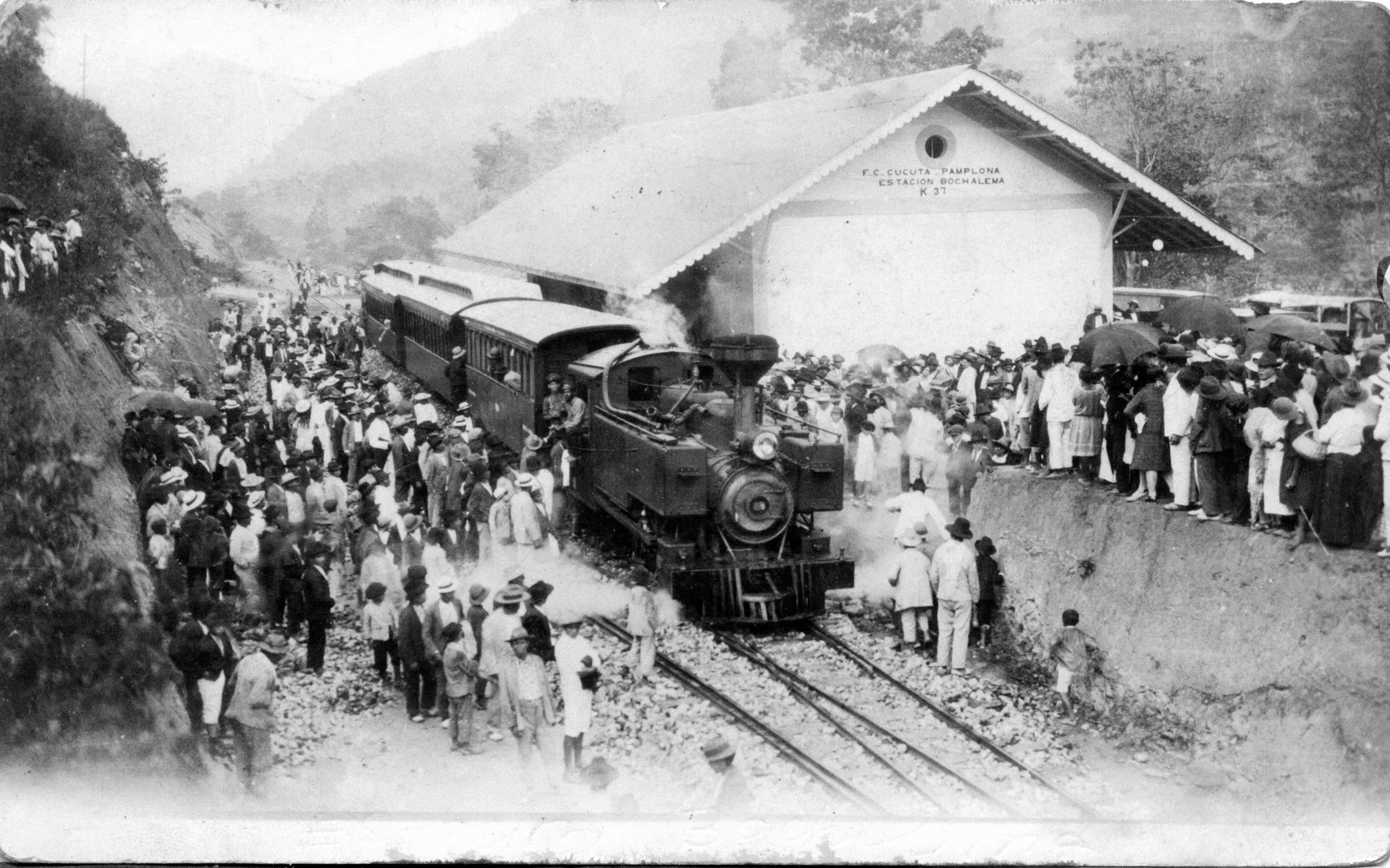 Ferrocarril de_Cúcuta - Ruta_Cúcuta-Pamplona - Estación Bochalema - K 37. Tomada en 1928.